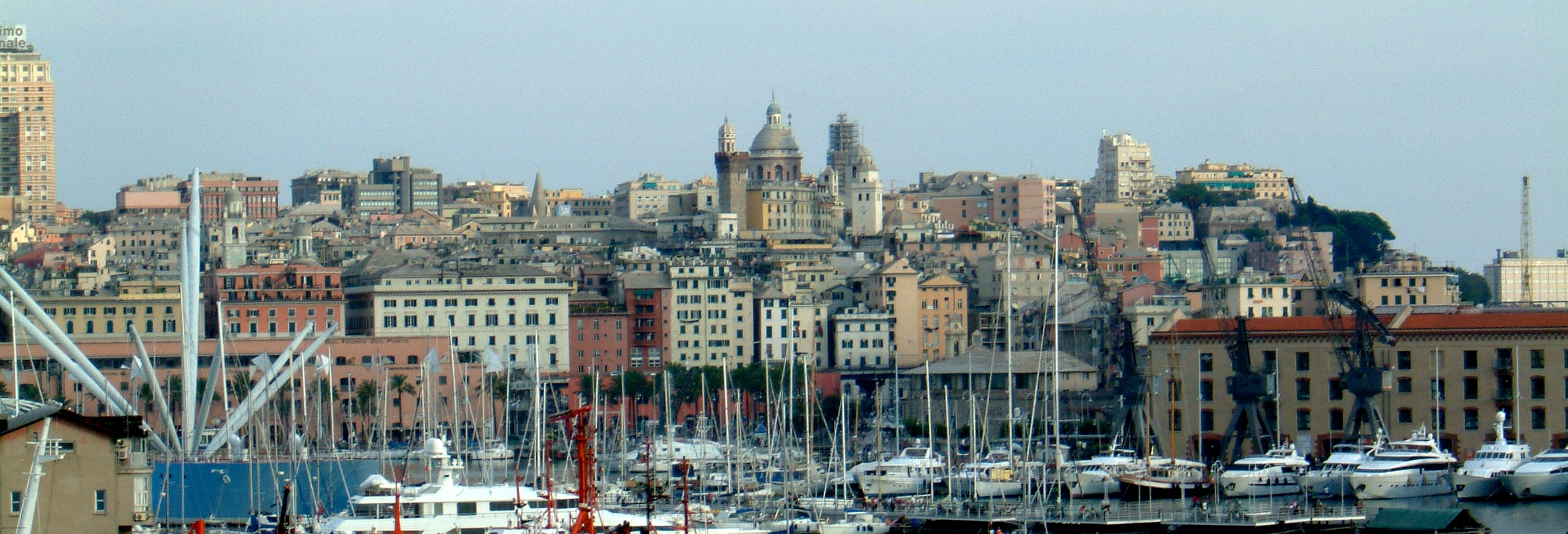 Genua, Blick_vom_Hafen_aus